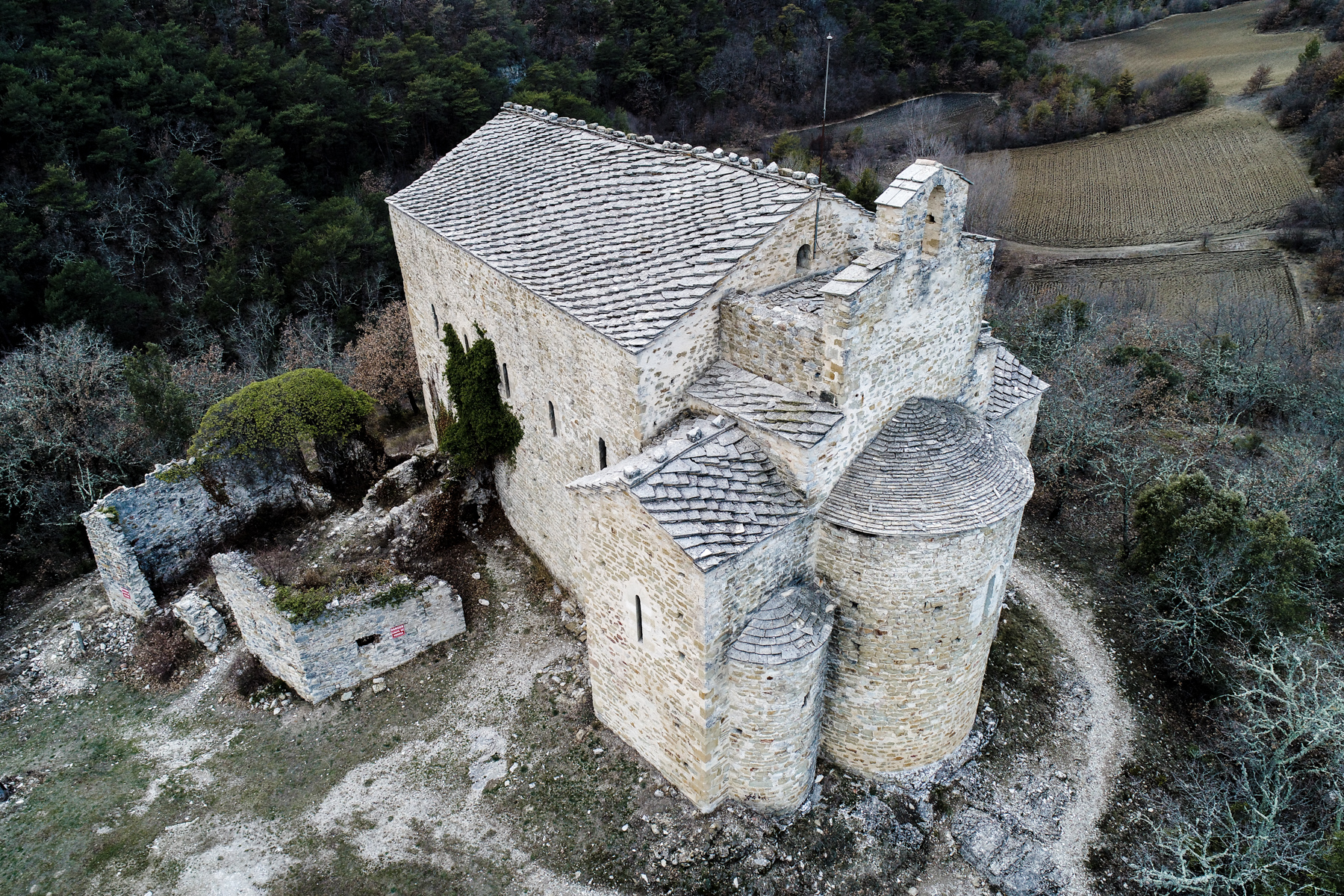 Chapelle Saint-Donat de Montfort, Alpes-de-Haute-Provence. Prise de vue aérienne, vue sur la toiture et couverture de la chapelle.